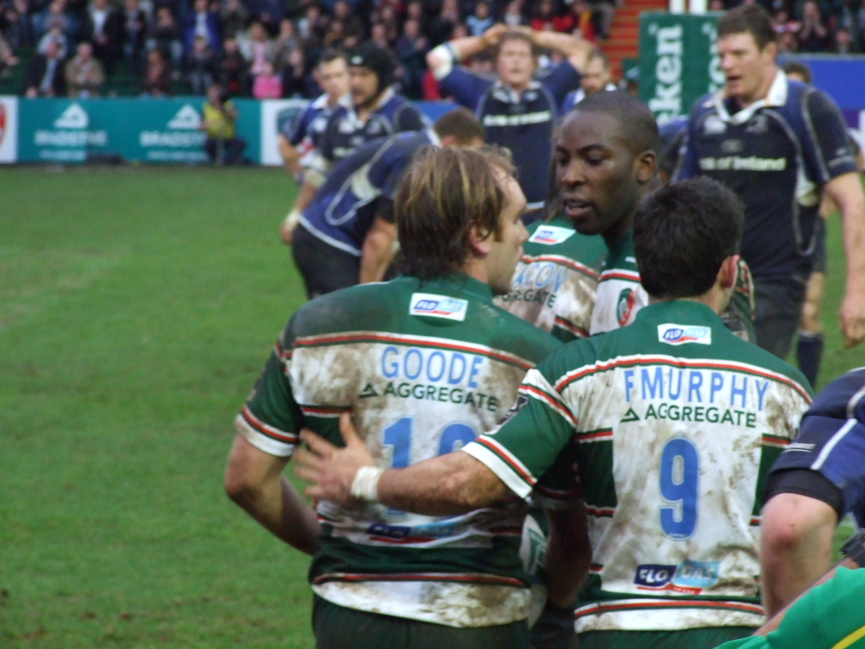 Leicester Tigers v Leinster - 19 January 2008 (63) - Andy Goode, Frank Murphy - Poule 6 6°journée Heineken Cup - Welford Road, Leicester Leicester Tigers 25 - 9 Leinster